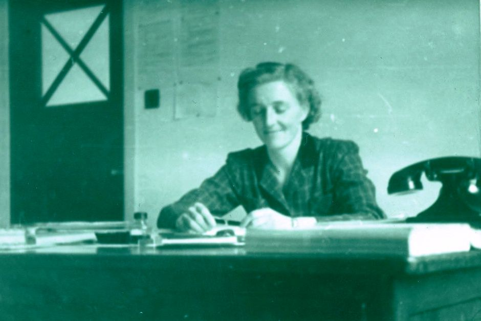 Marie-Jeanne Ballière is de eerste directrice van Ipsoc.